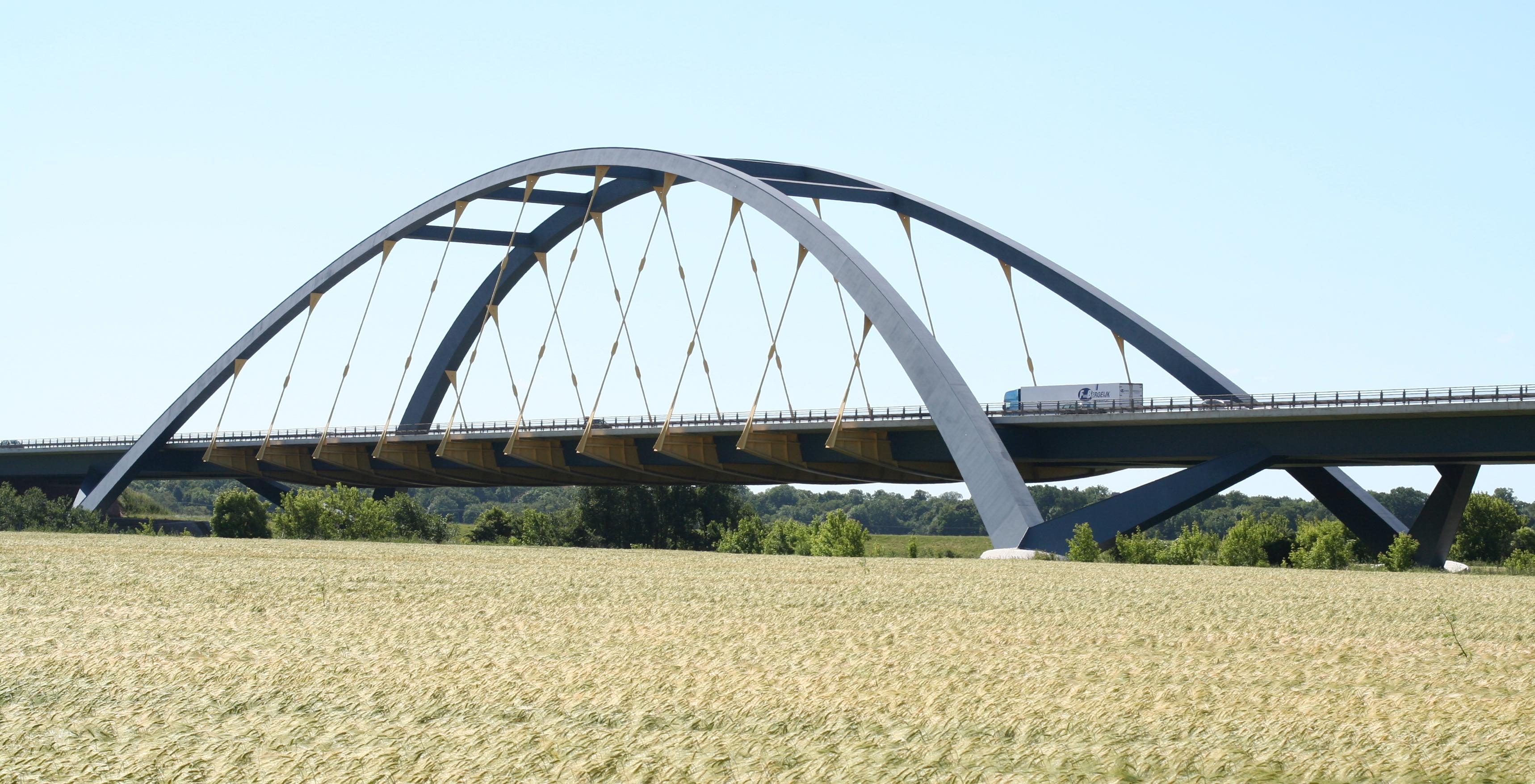 Saalebrücke der A14 bei Beesedau, OT Könnern in Sachsen-Anhalt